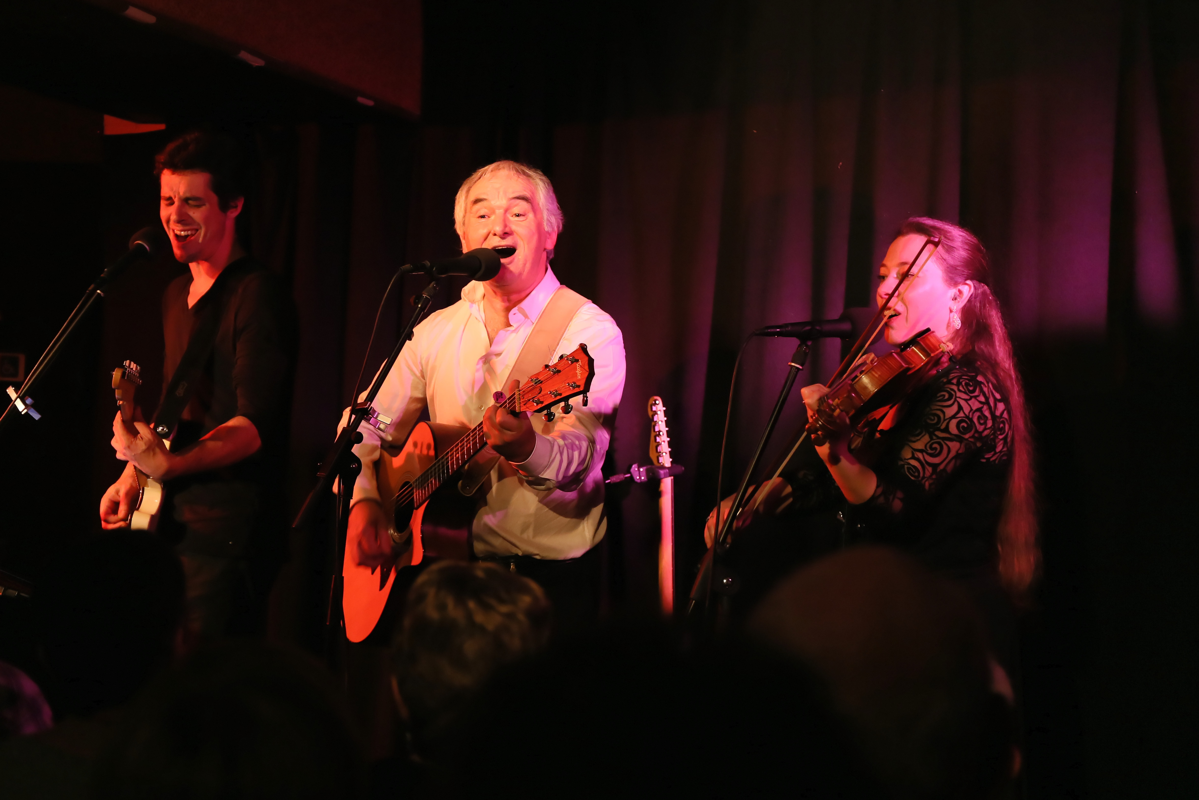 Gérard Jaffrès au Trousse Chemise à Langan le 20 novembre 2015.